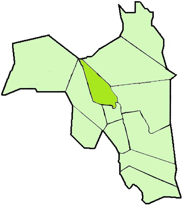 Lapinjärven kartta: Vasarankylän sijainti